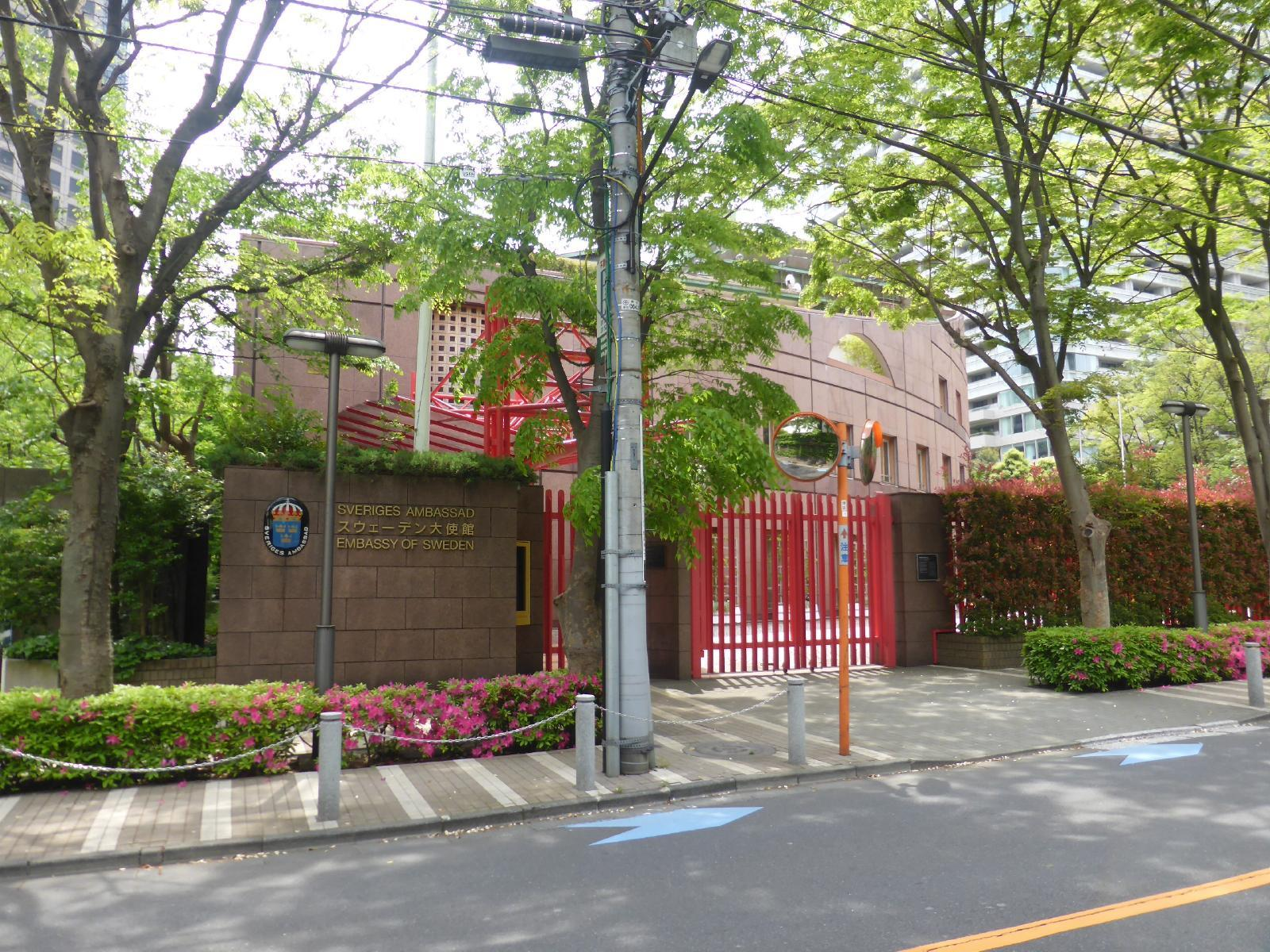 スウェーデン大使館正面玄関